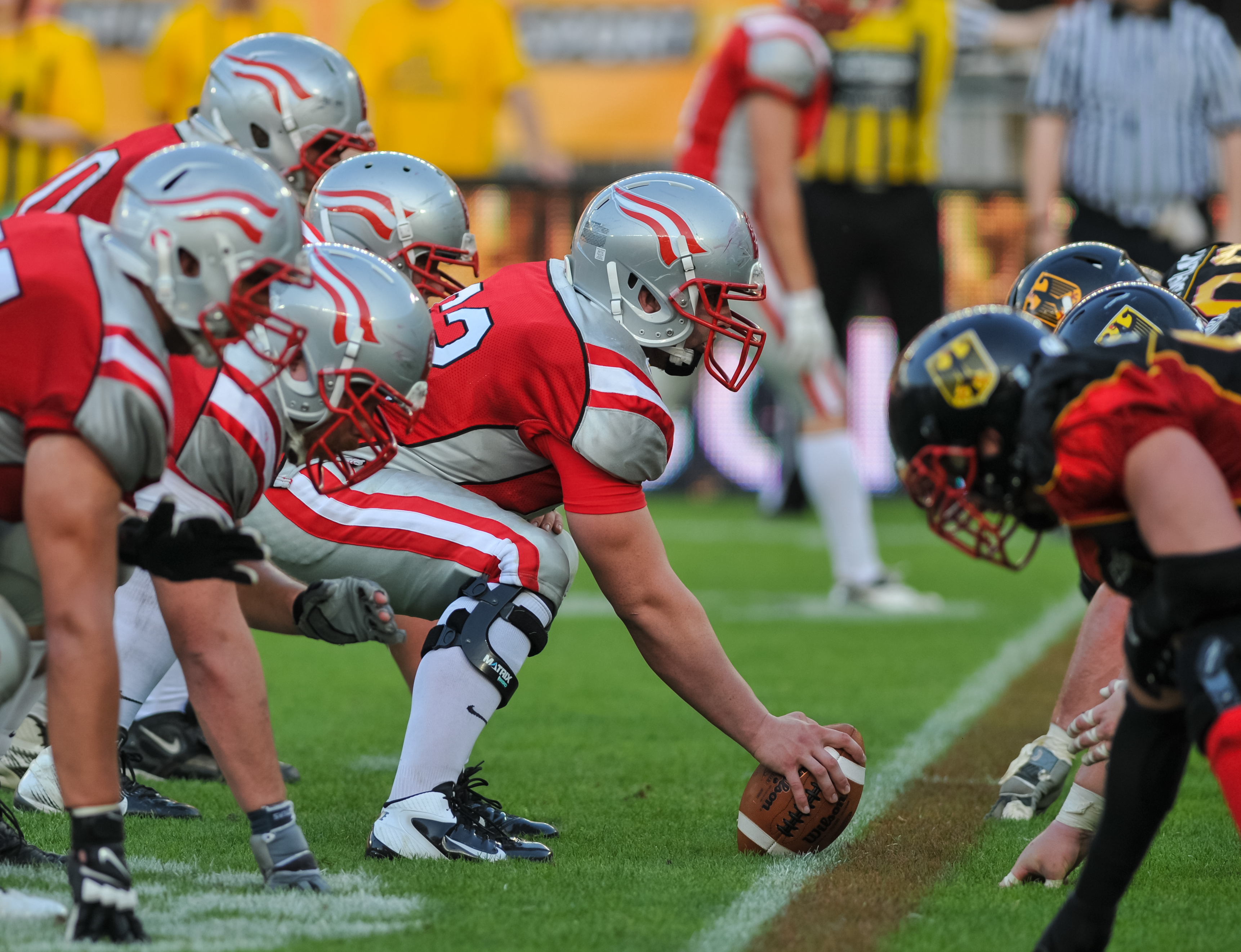 Finalspiel der Football-EM 2014 zwischen Österreich und Deutschland.